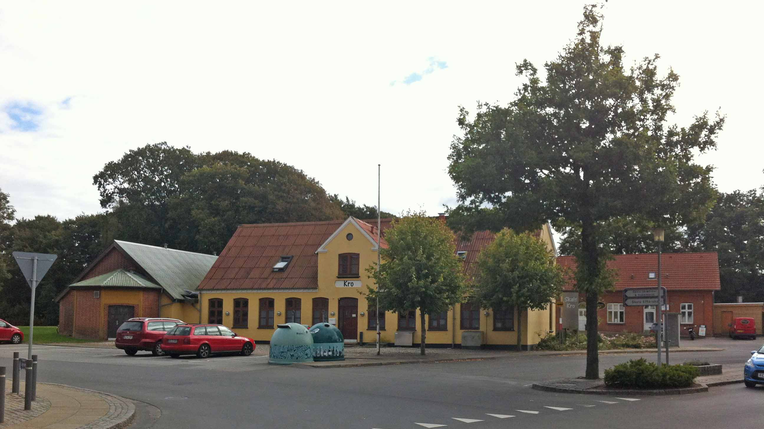 Skals Kro